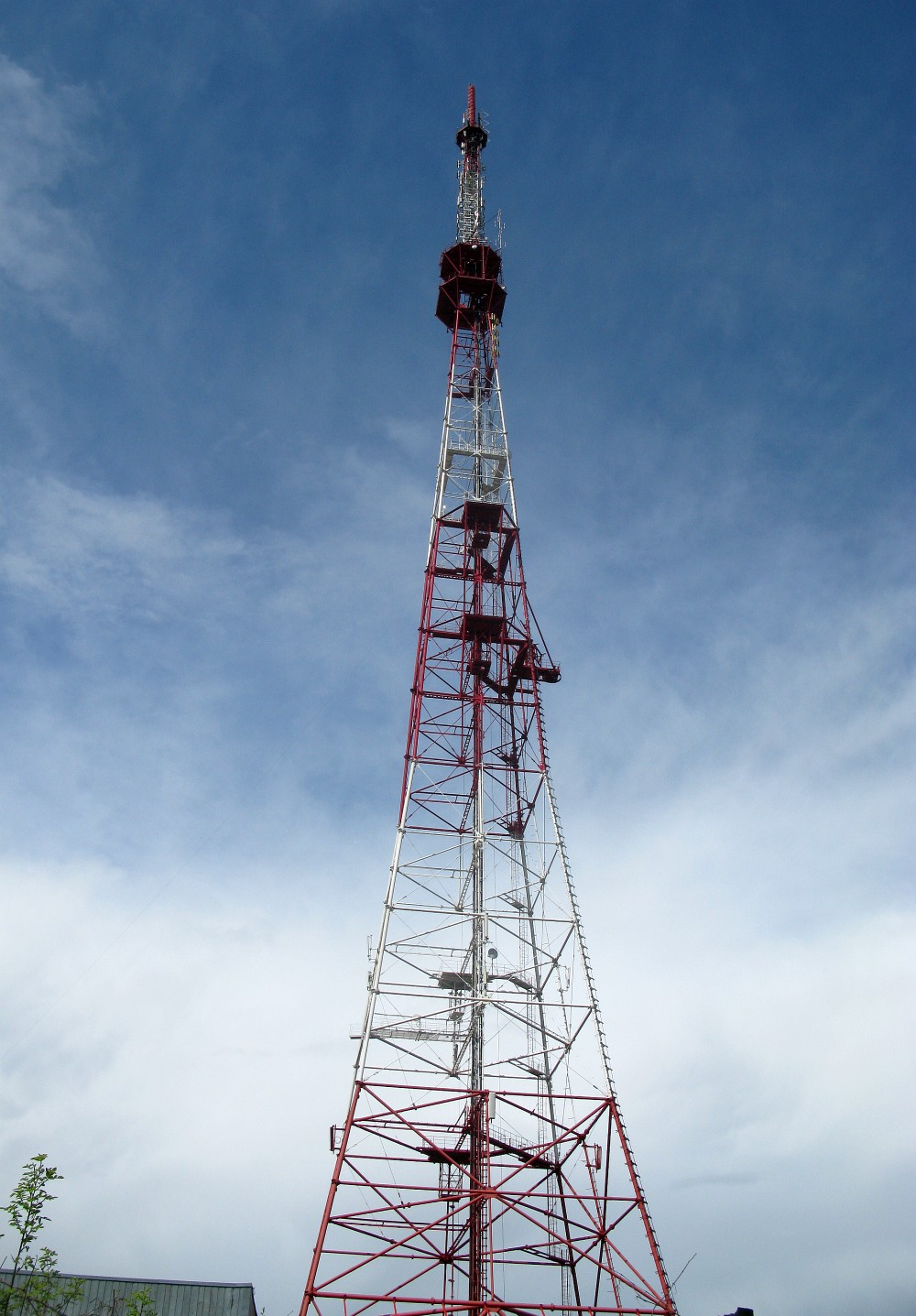 Фото телевизионной башни в городе Томске